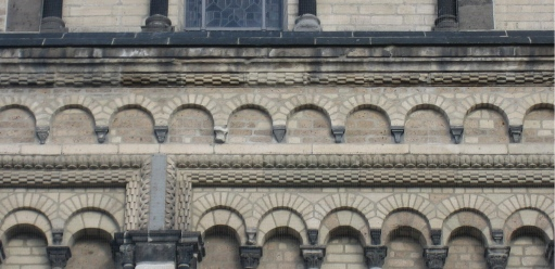 Doppelter, romanischer Bogenfries am Quirinusmünster in Neuss